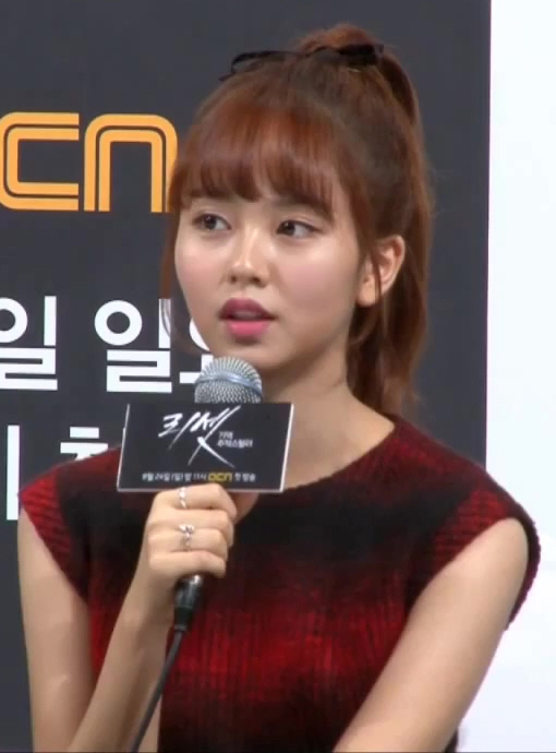 리셋 김소현, 또래보다 두각 아직 부족한 점 많다 (MD동영상)